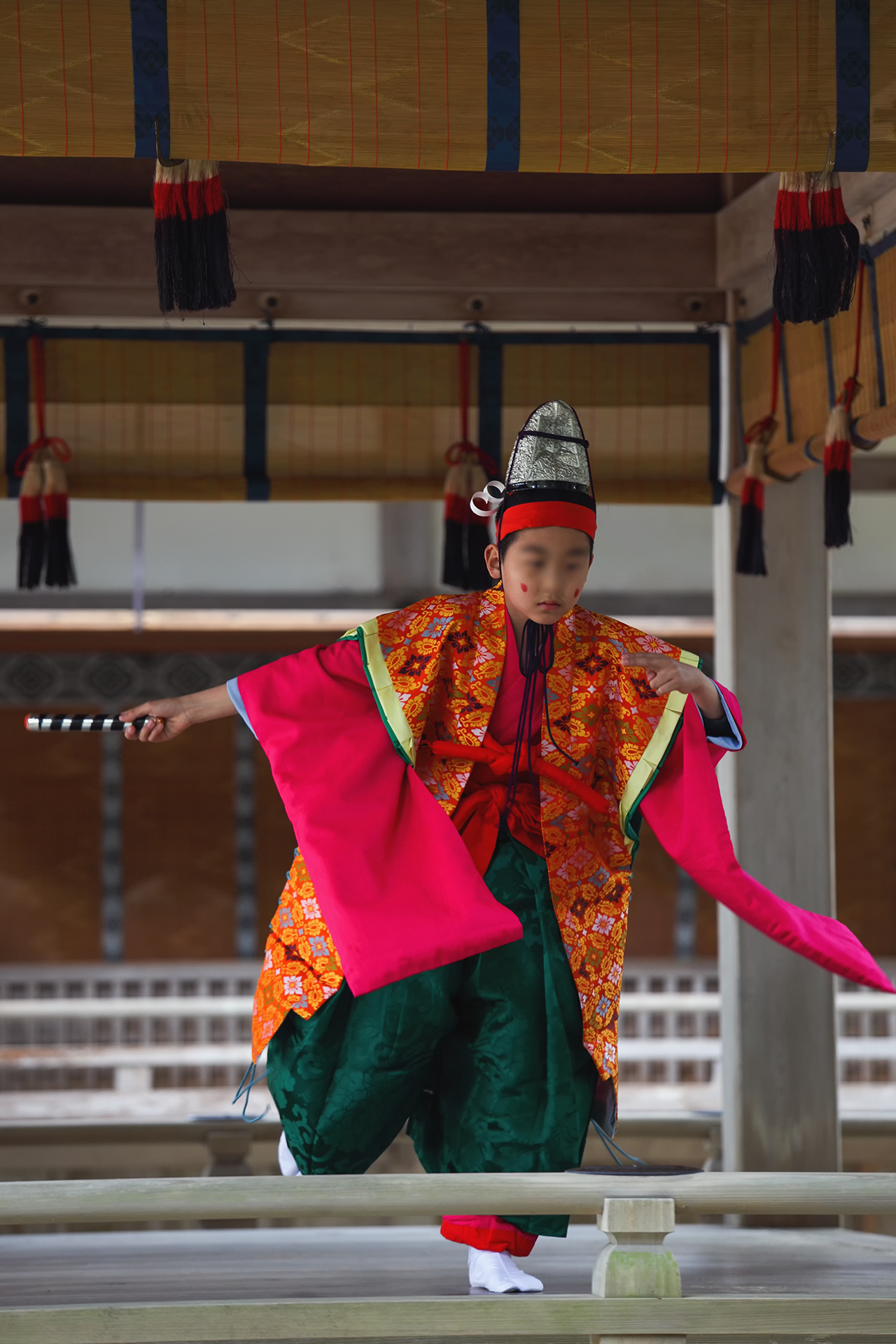 越後一宮彌彦神社の妻戸大神例祭（妃神例祭）に舞殿で奏される、舞楽「大々神楽」の「児納蘇利」（稚児舞一人）。国重要無形民俗文化財に指定されている。